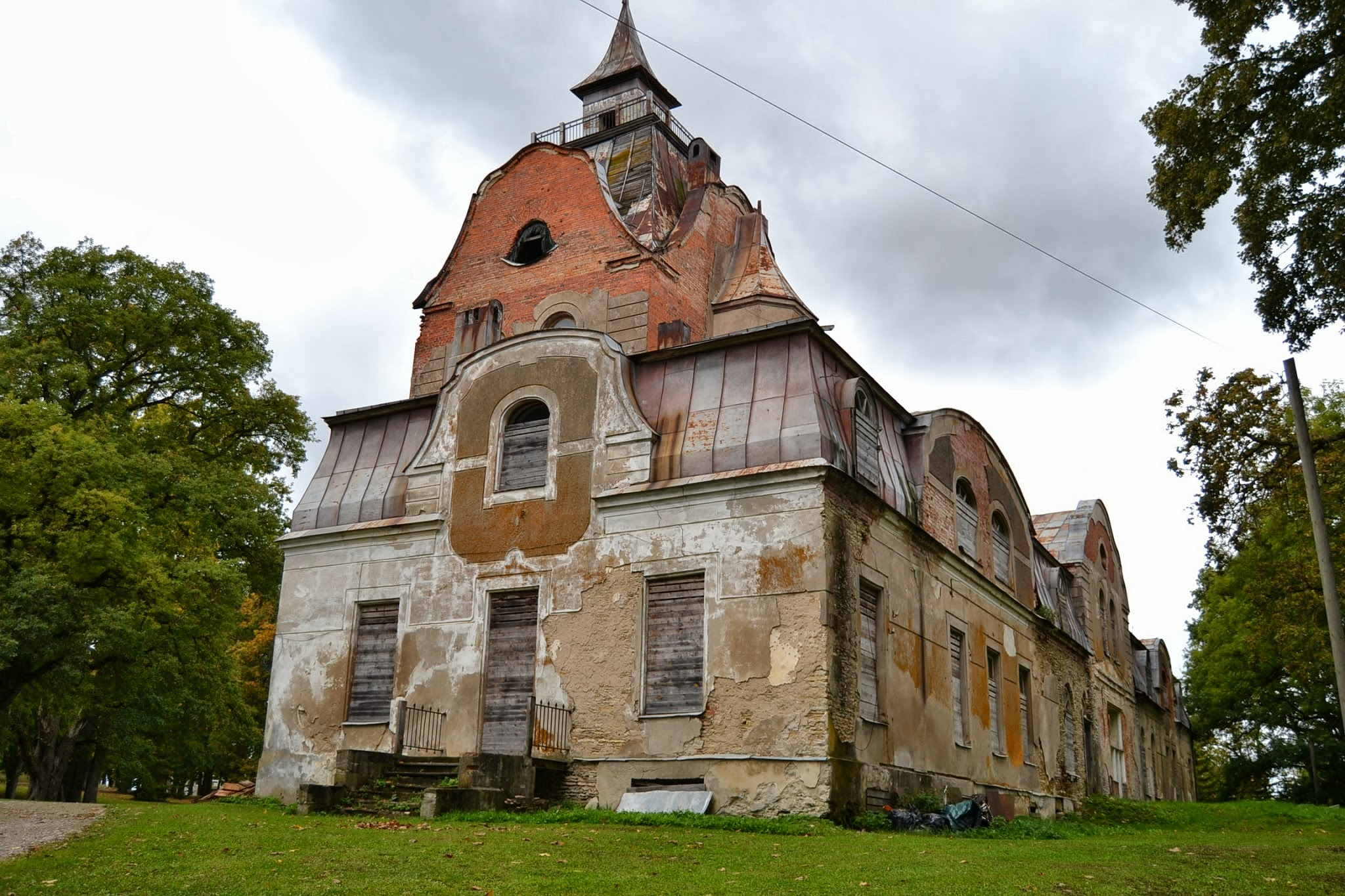 Neeruti mõisa peahoone